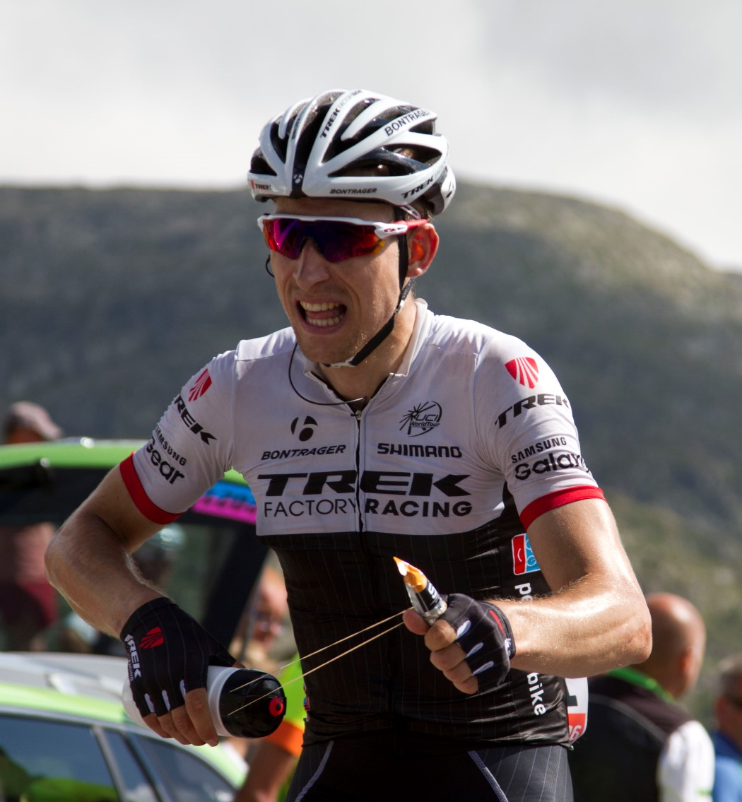 061 mollema